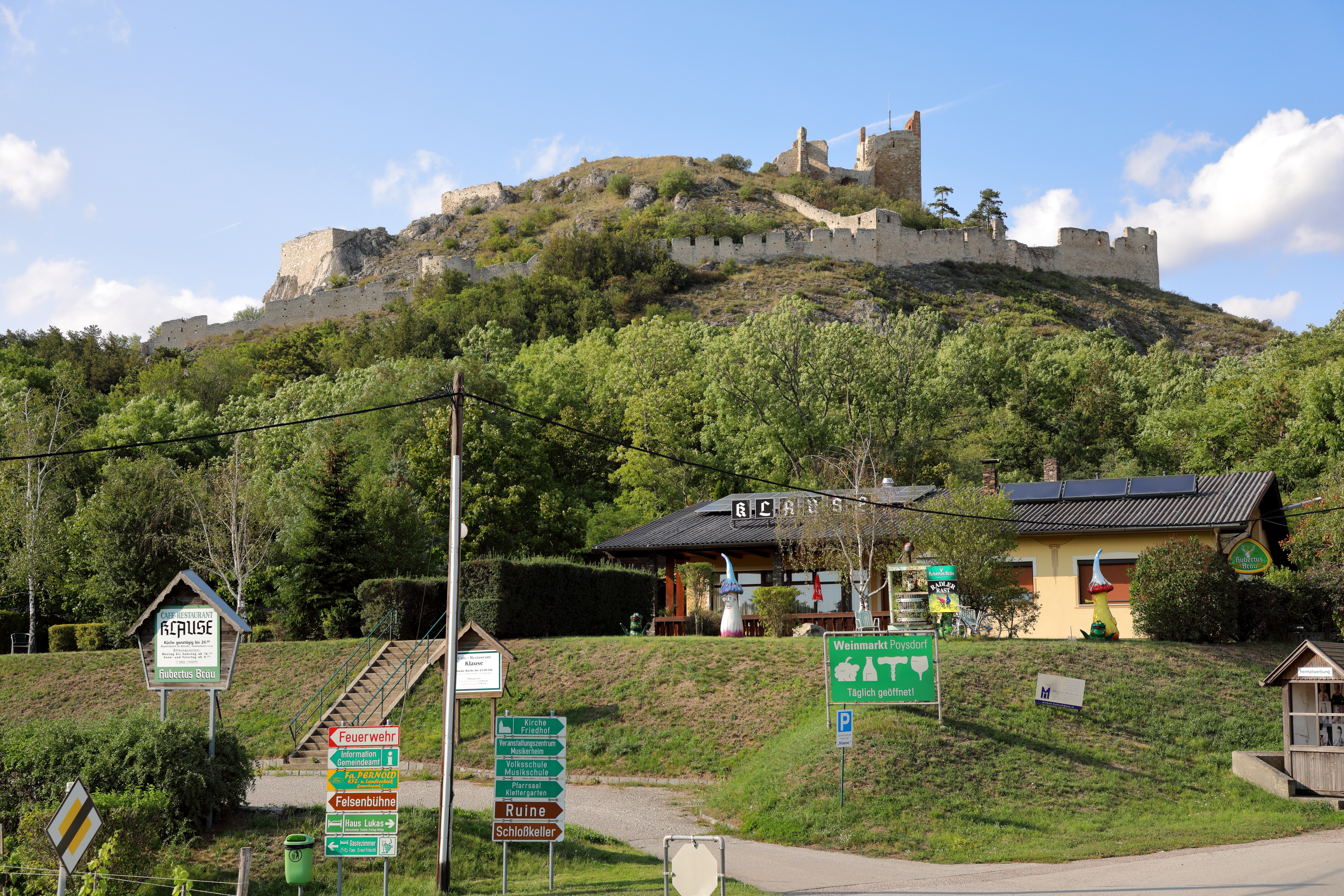 Südsüdostansicht der Burgruine Staatz auf dem 332 m hohen Staatzer Berg in der niederösterreichischen Marktgemeinde Staatz. Die ehemalige Burg wurde im Zuge des Dreißigjährigen Krieges am 24. April 1645 von den Schweden zerstört.